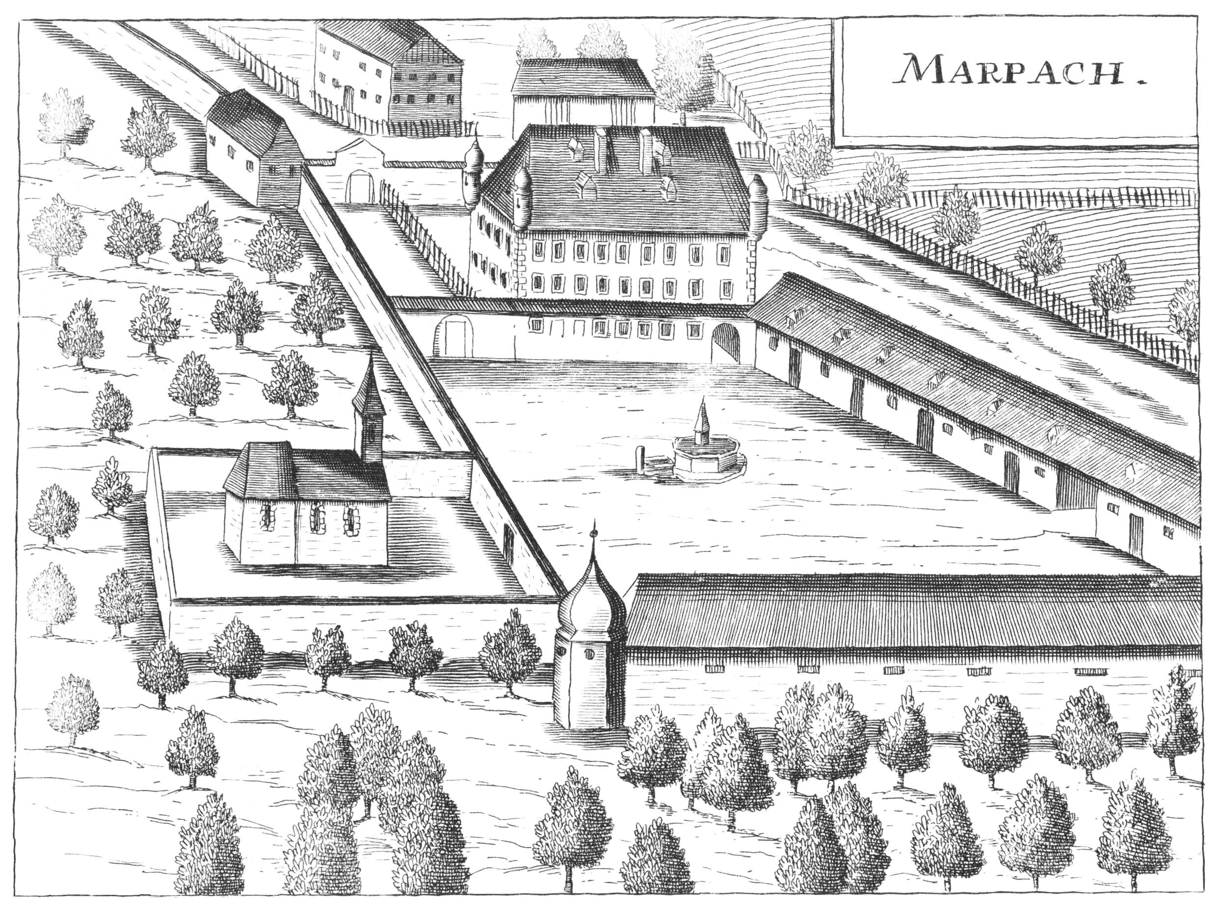 Schloss Marbach nach einem Stich von Georg Matthäus Vischer von 1674